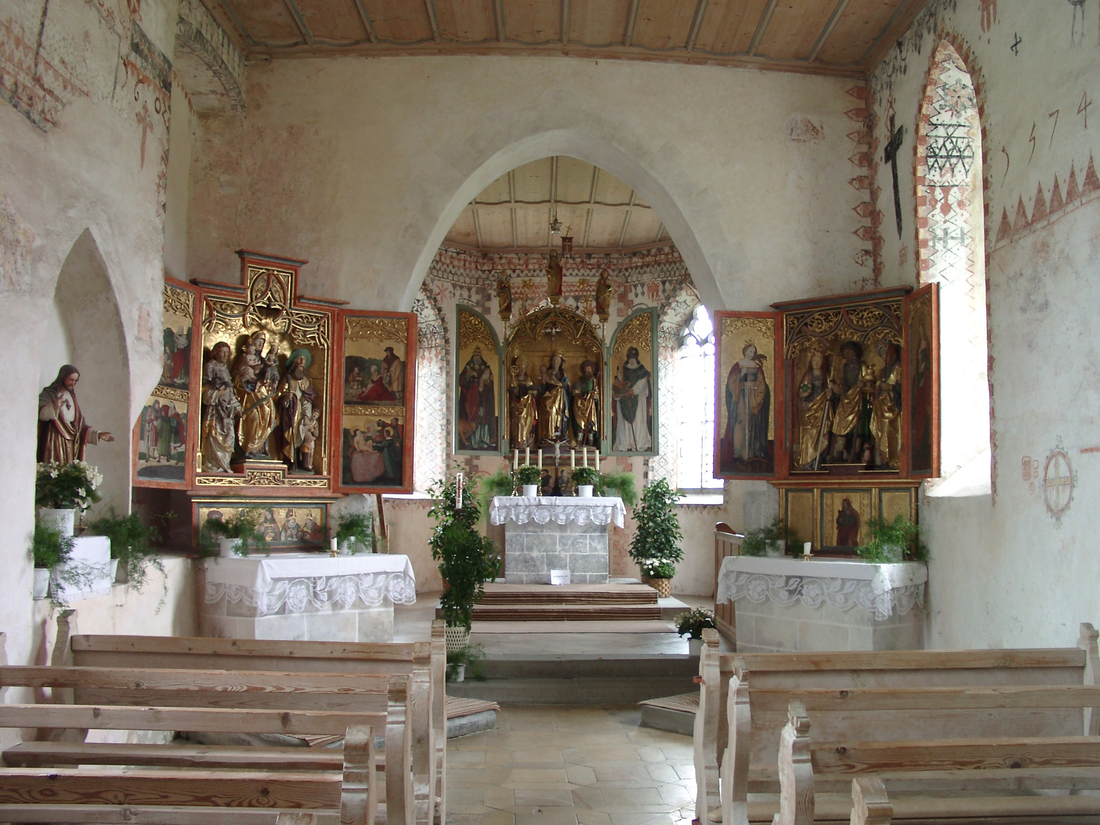 Spätgotischer Innenraum der Stephanskapelle in Genhofen mit spätgotischen Altären bemerkenswerter Qualität. Genhofen ist ein Ortsteil von Stiefenhofen im Allgäu.